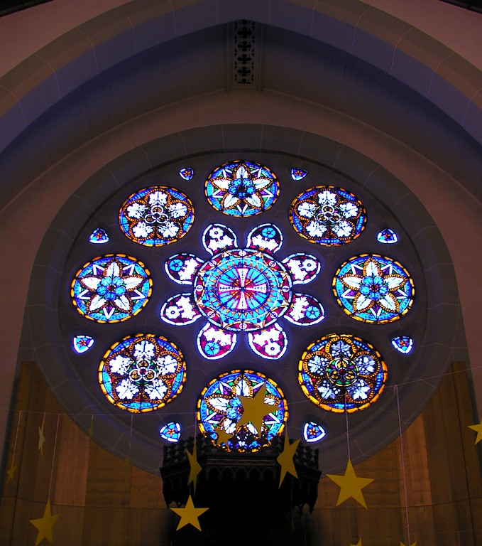 Rosace: Temple Farel, grand vitrail remarquable du XIXème s., La Chaux-de-Fonds